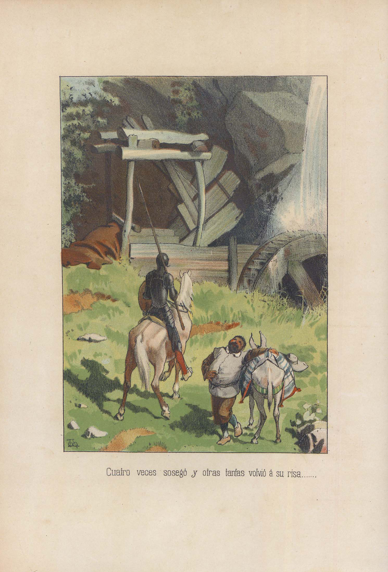 Cuatro veces sosegó y otras tantas volvió a su risa.